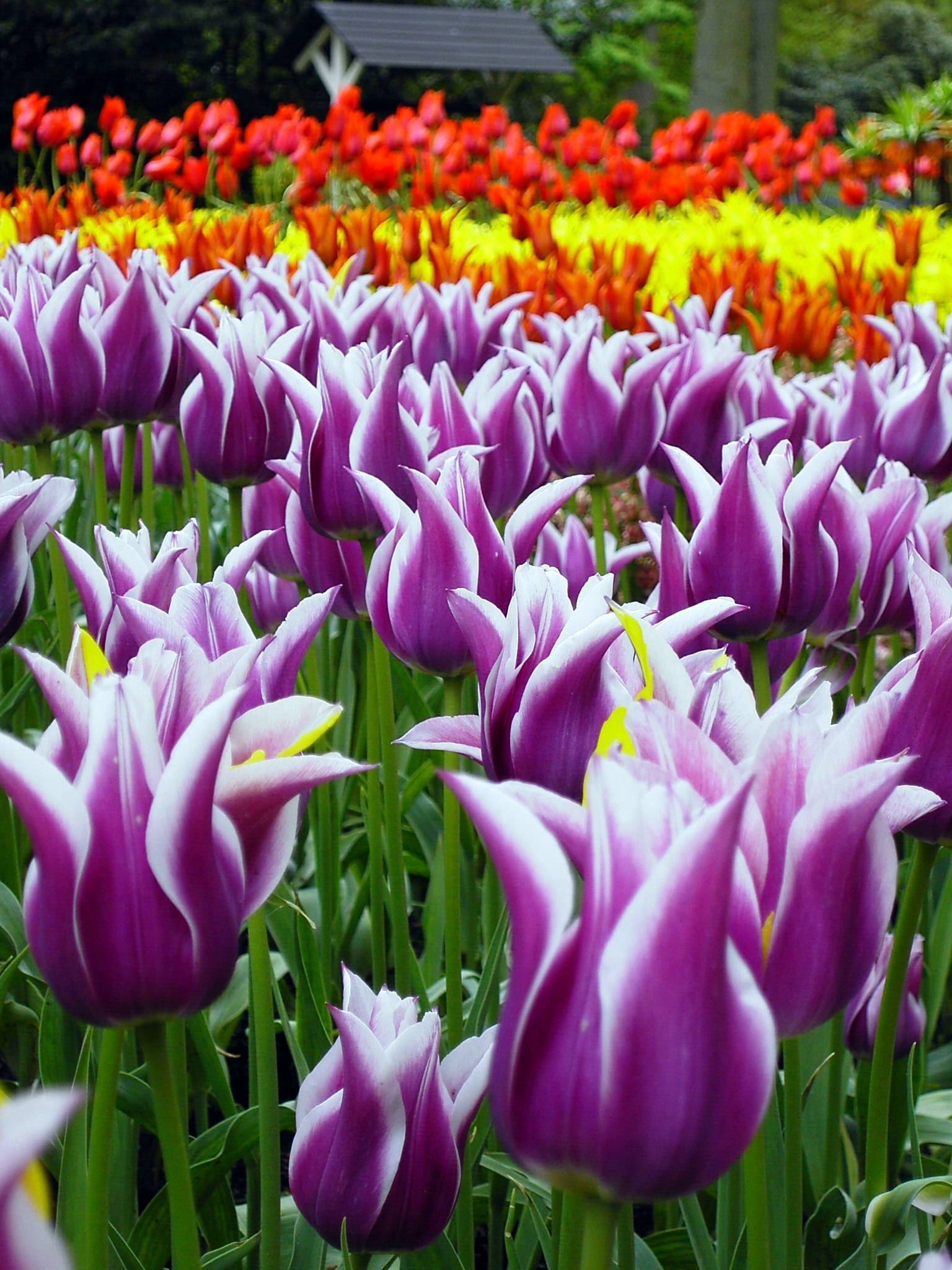 Parque Keukenhof